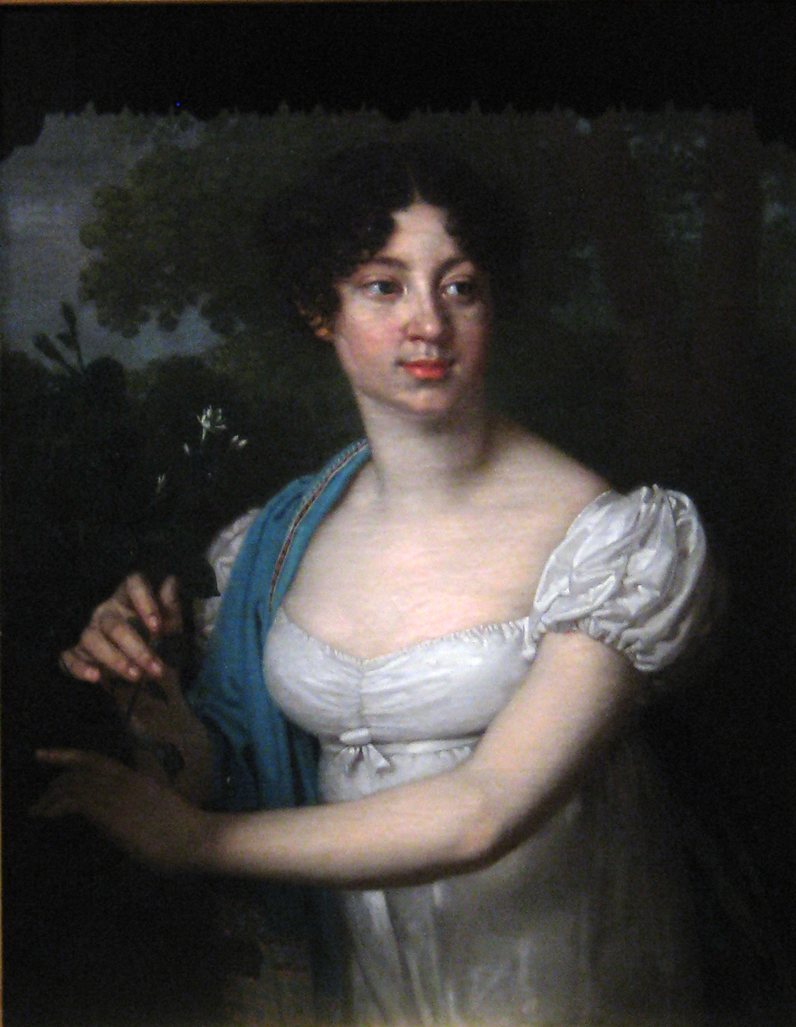 Портрет Екатерины Александровны Миркович, урожденной Чичериной. Художник Владимир Боровиковский. 1808. ГИМ